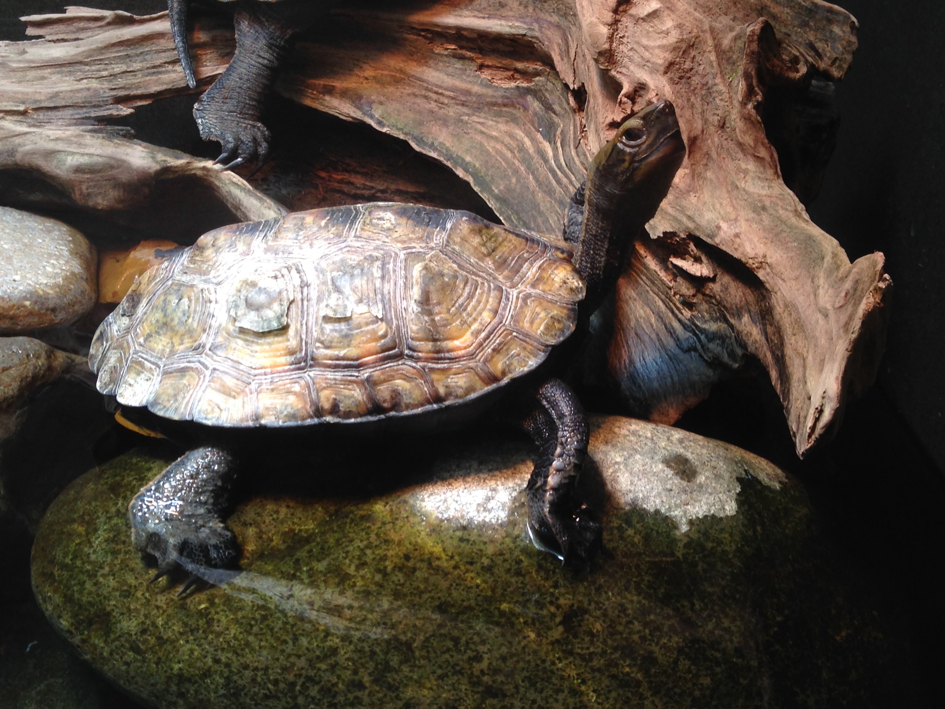 ニホンイシガメ。アクア・トトぎふの飼育個体。